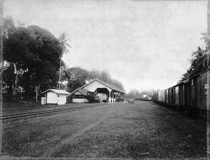 Foto. Het spoorwegstation bij de suikeronderneming Poerwokerto. Het smalspoor werd vooral gebruikt voor transport ten behoeve van de fabriek.